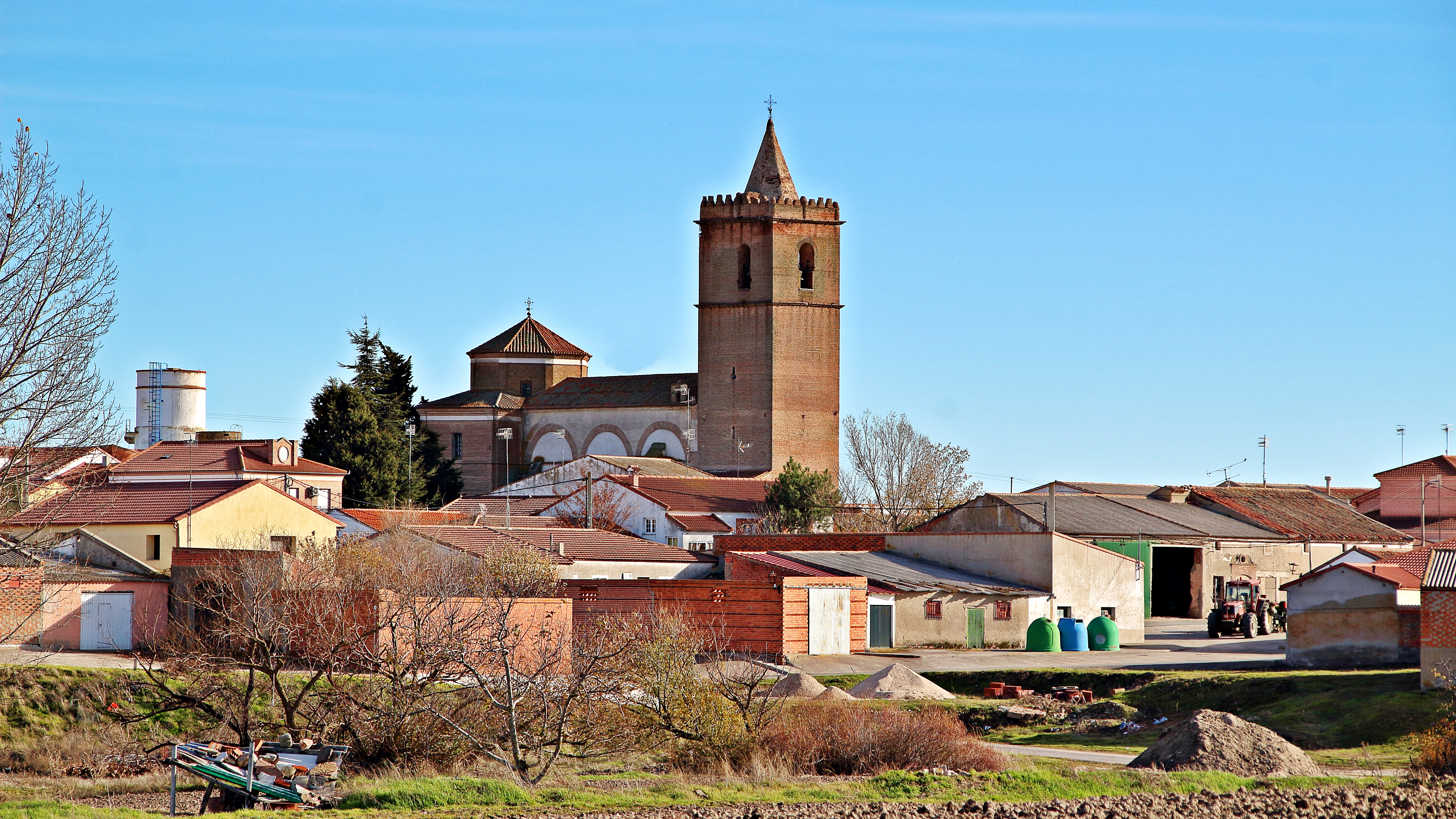 Cisla municipio de la comarca de La Moraña en la provincia de Ávila